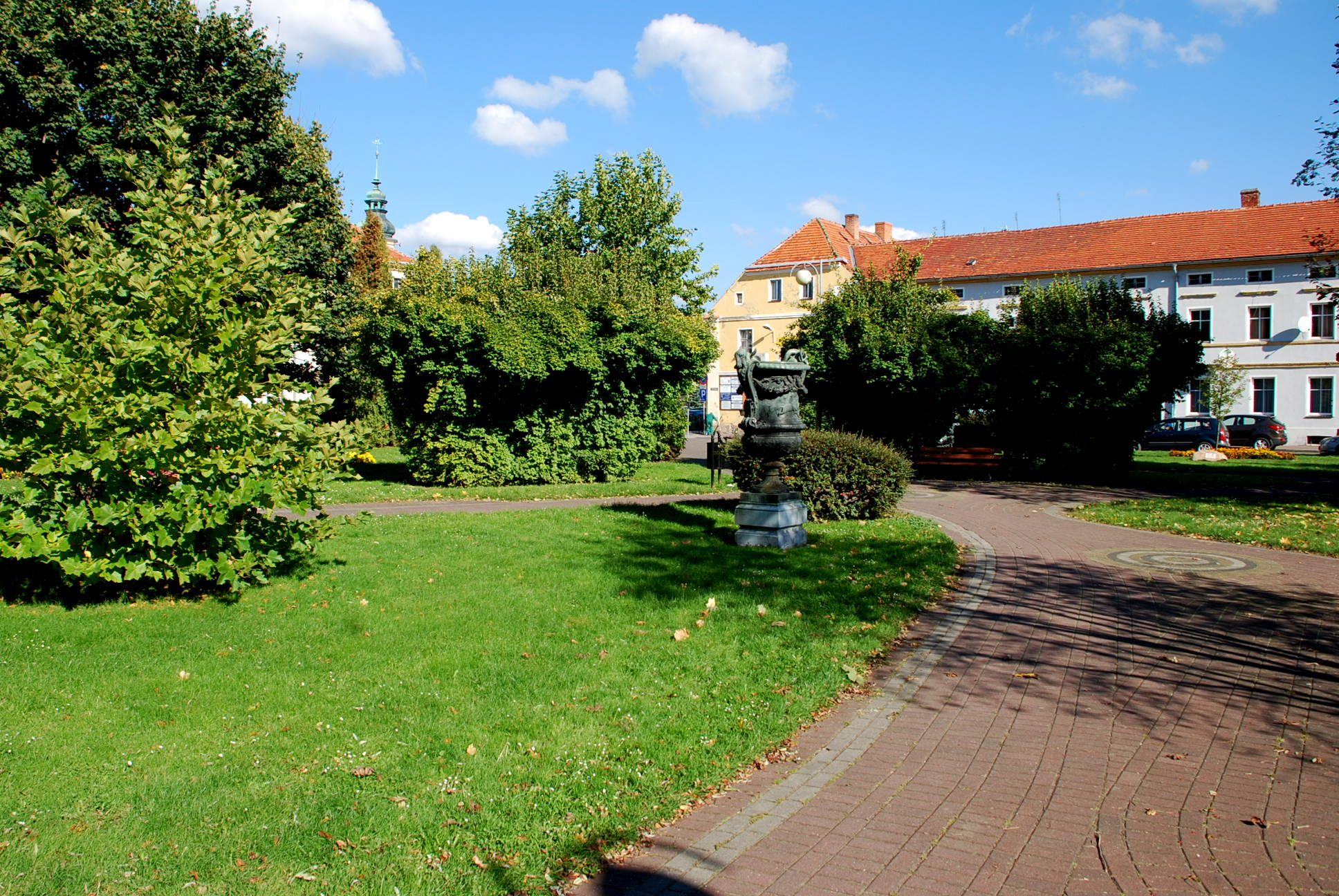 Plac Wolności